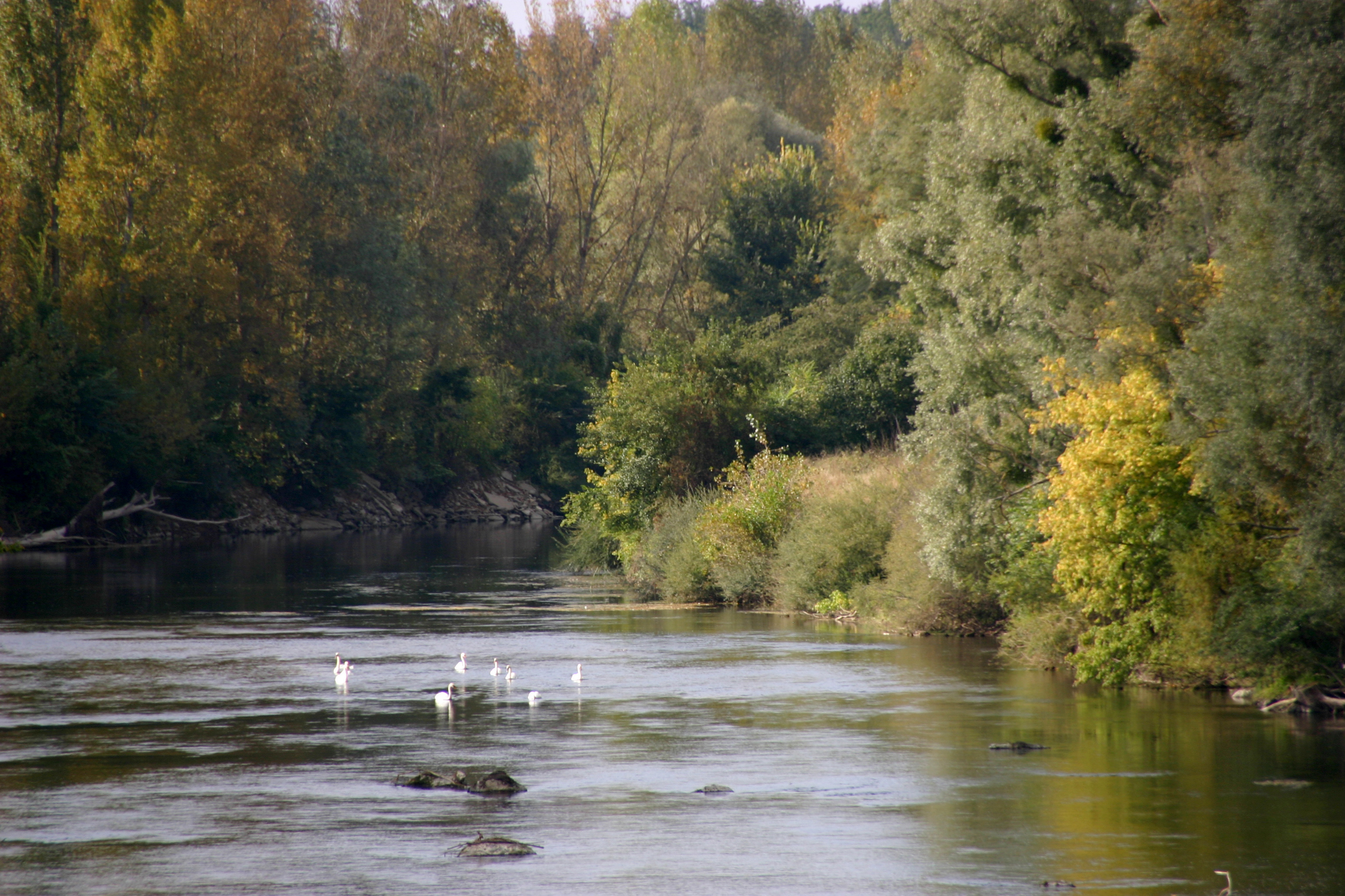 Fluss Yèvre bei Mehun